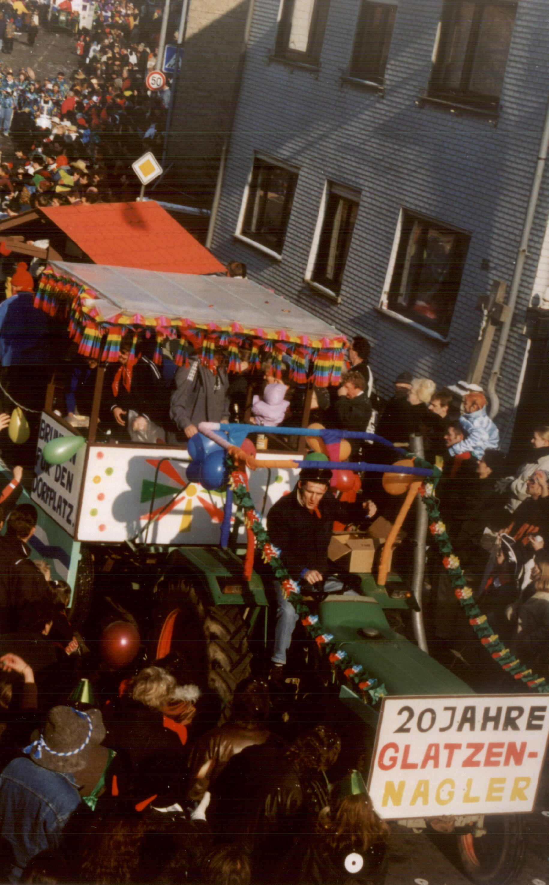 Beselich-Obertiefenbacher Fastnachtszug 1999